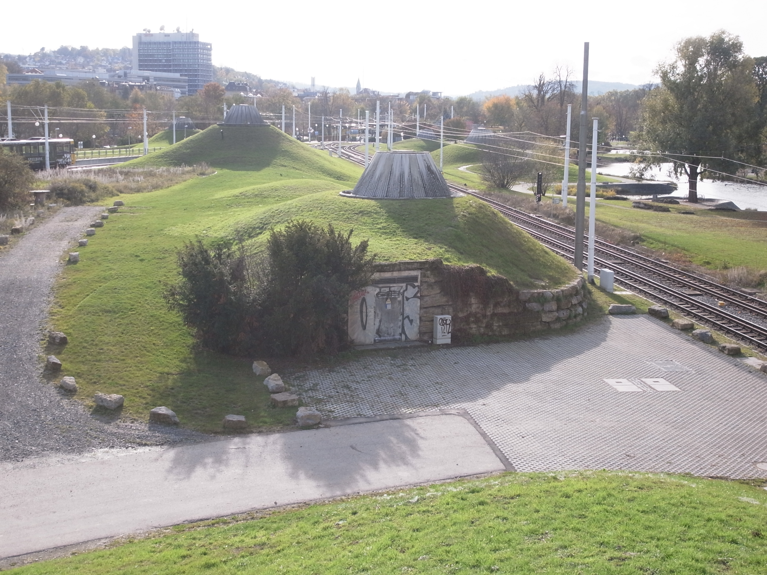 Blick über 5 der Berger Sprudler (Unterer Schlossplatz / Stuttgart)